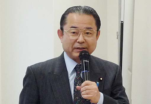 衆議院議員田中和徳